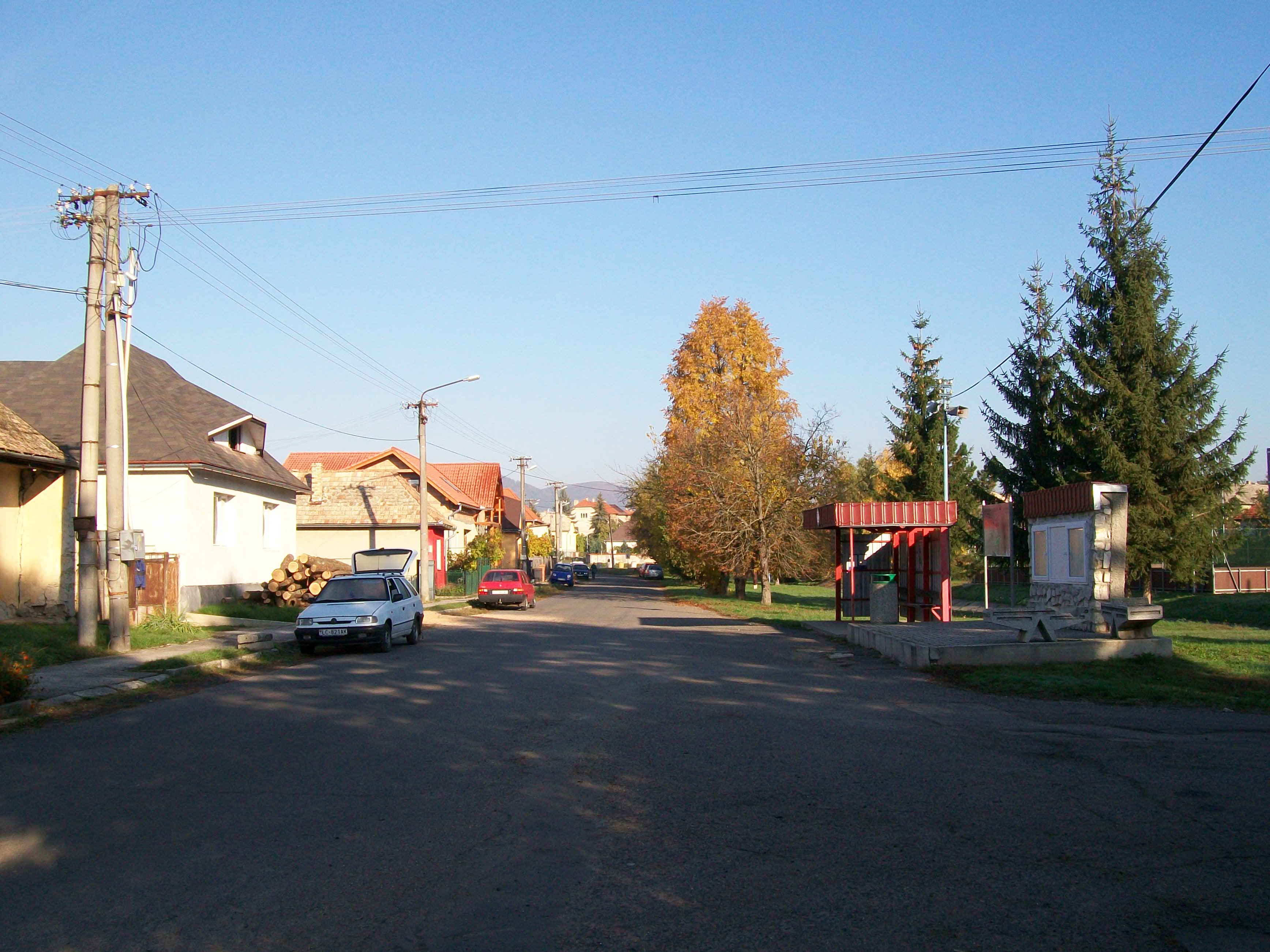 Obec Mašková v okrese Lučenec